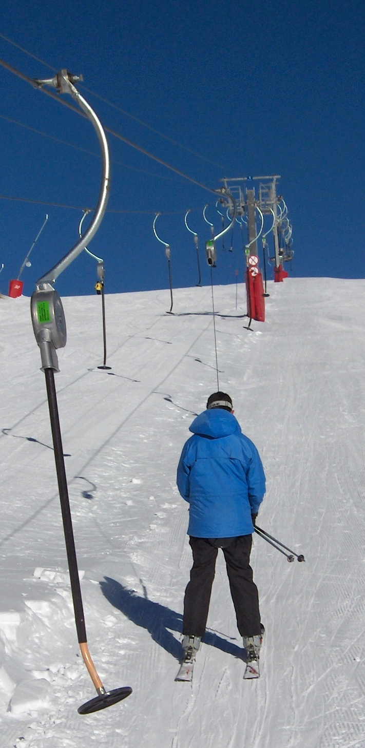 Telesquí de perxa enrotllabe als Angles (Capcir, Catalunya Nord). (foto pròpia) Téléski non-debrayable.